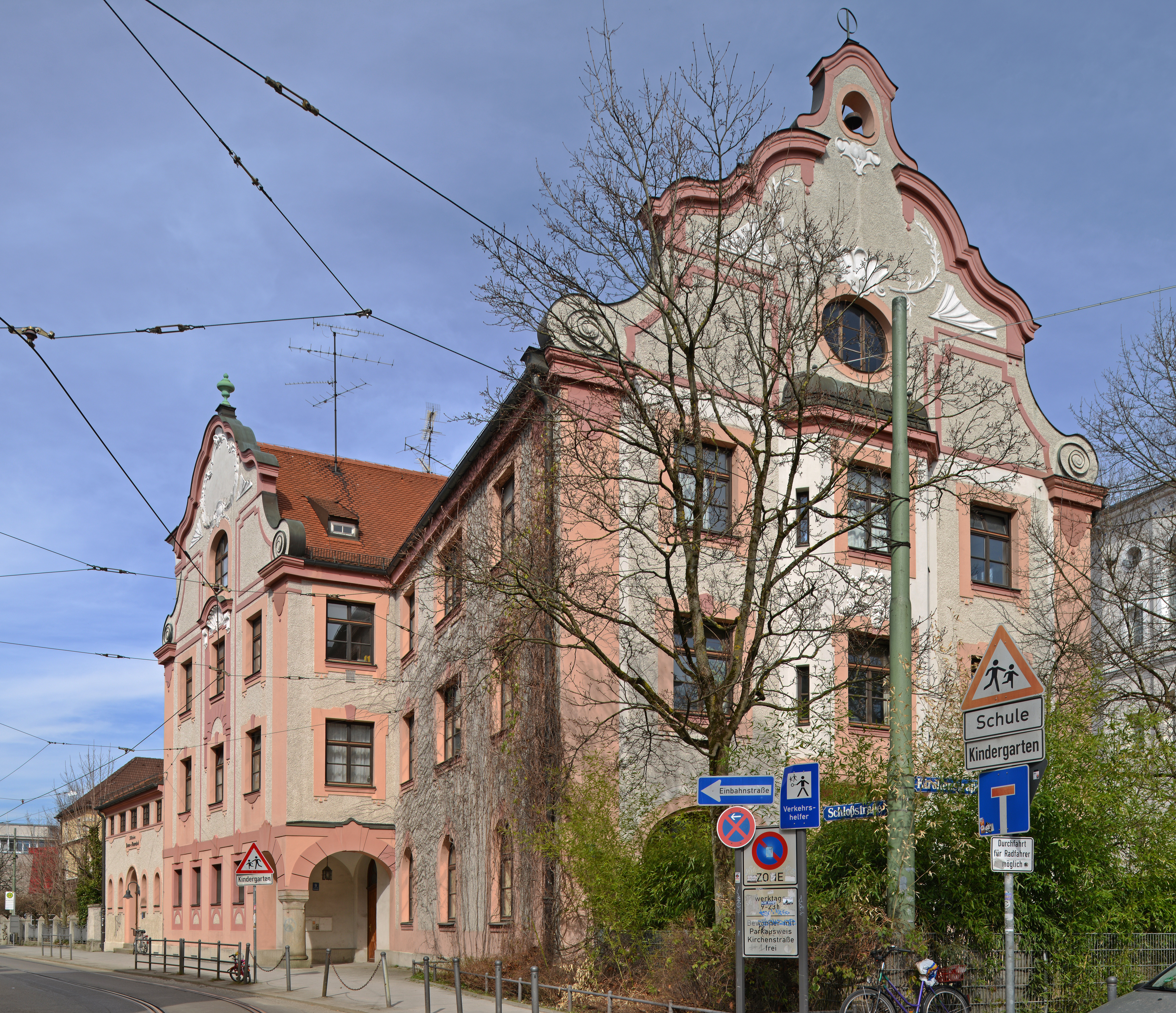 München, Haidhausen. An der Ecke Kirchenstraße und Schloßstraße erblicken wir die Ehemalige Feuerwache, öffentliche Bedürfnisanstalt und Brausen-, und Wannenbad aus dem Jahr 1894.